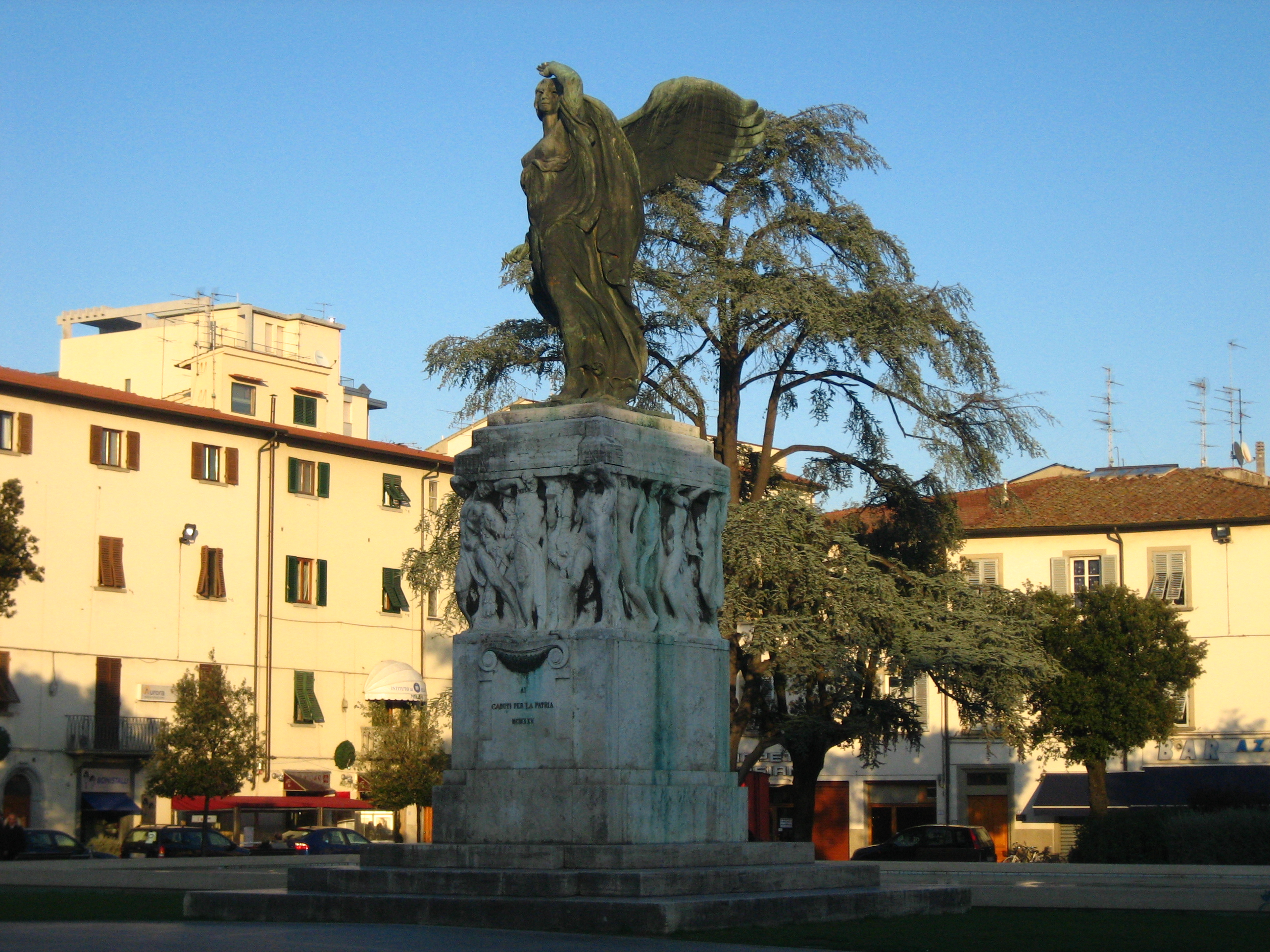 Monumento di Dario Manetti e Carlo Rivalta 1925 This is a photo of a monument which is part of cultural heritage of Italy.